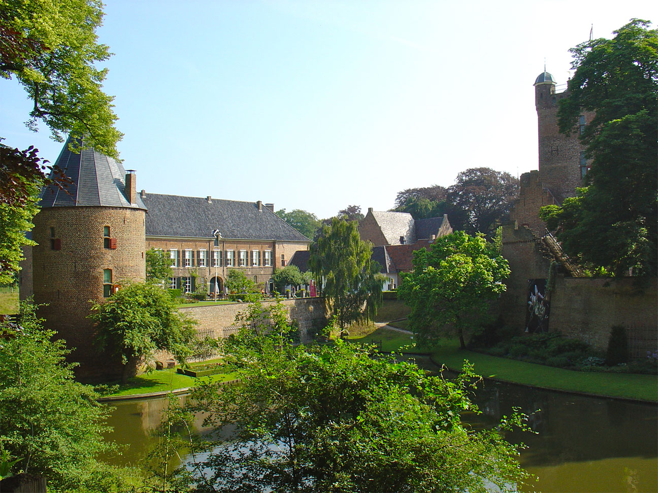 Huis Bergh te 's-Heerenberg